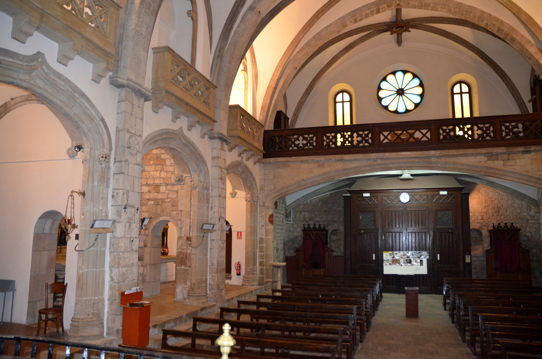 Barcelona, interior de la capella templera de Palau, remodelada per la família Requesens el s. XVI. Fot. J. Fuguet, 2014.